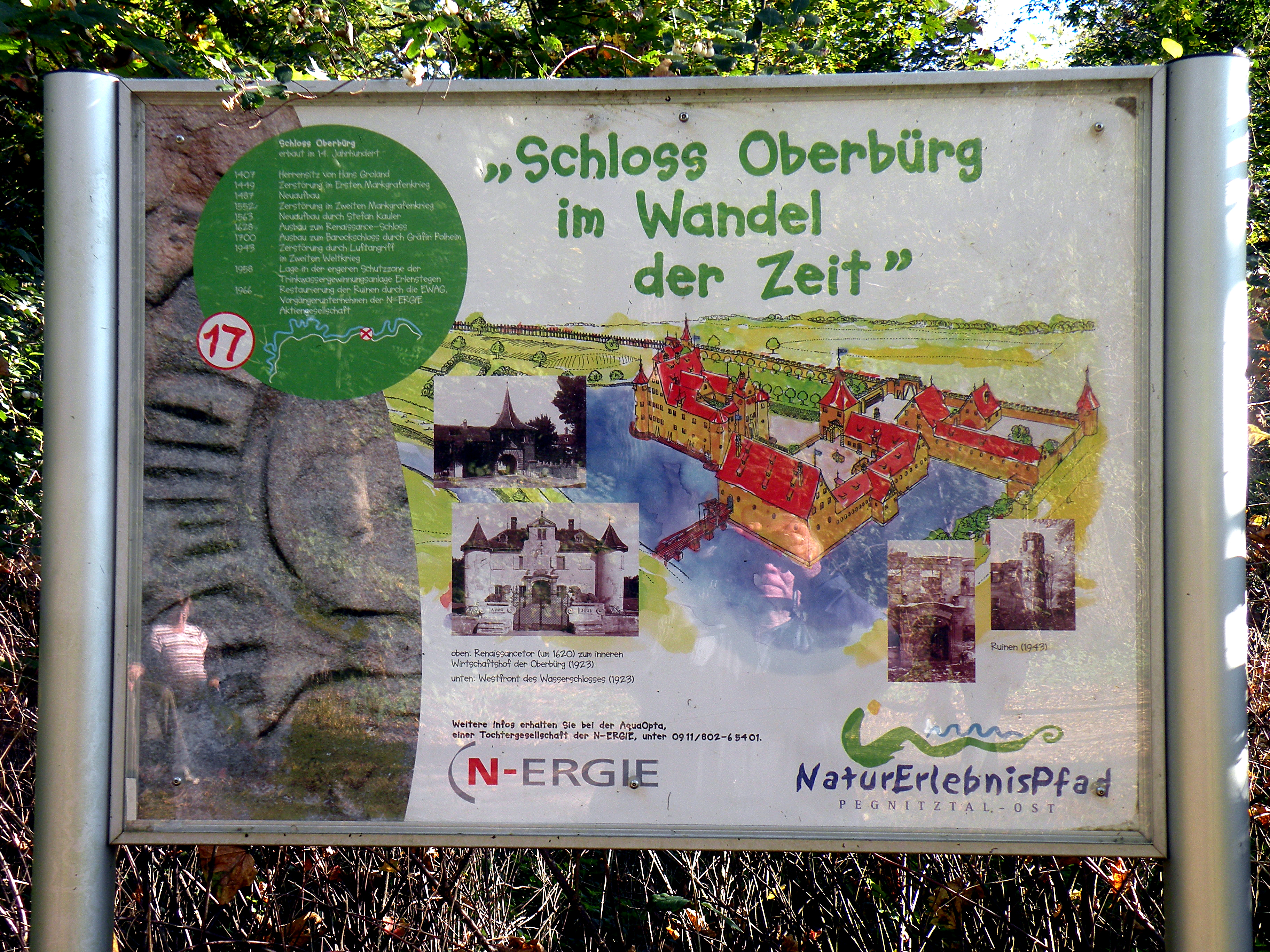 Вассершлосс Обербюрг.Аннотация